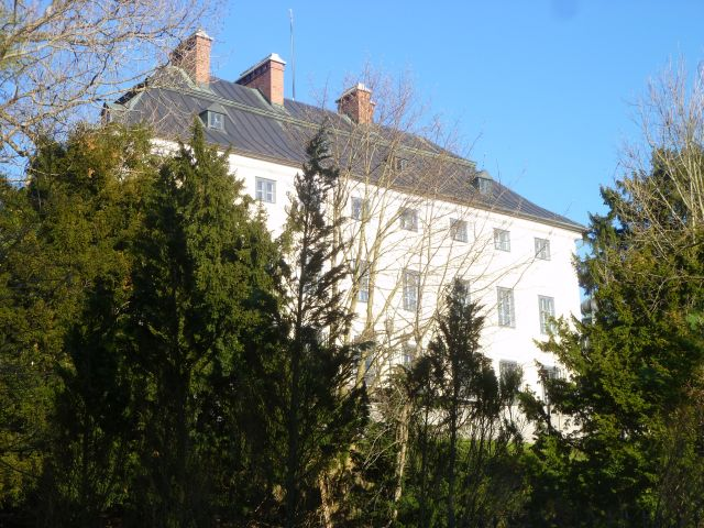 Schloss Sighartstein samt Nebengebäuden